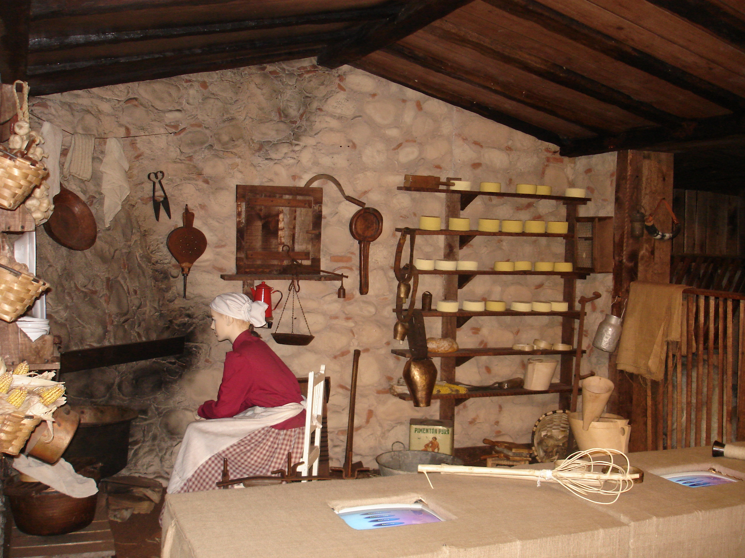 Idiazabal Gaztaren Interpretazio Zentroa